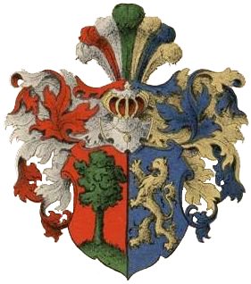 Wiedau suguvõsa aadlivapp